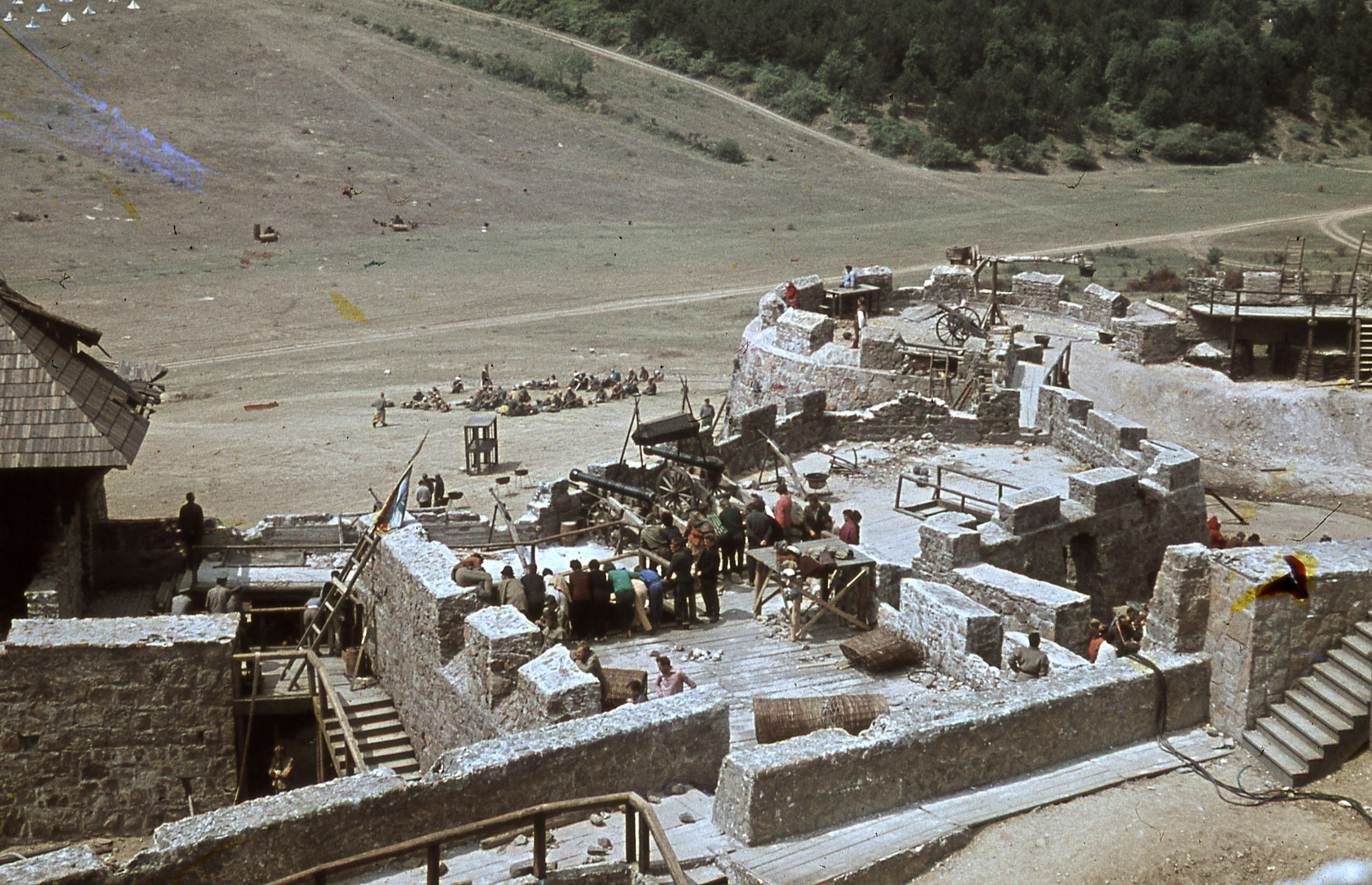 az egri vár kicsinyített mása az Egri csillagok című film forgatásakor. Location: Hungary, Pilisborosjenő Tags: colorful, filming, cannon, castle, ladder Title: az egri vár kicsinyített mása az Egri csillagok című film forgatásakor.